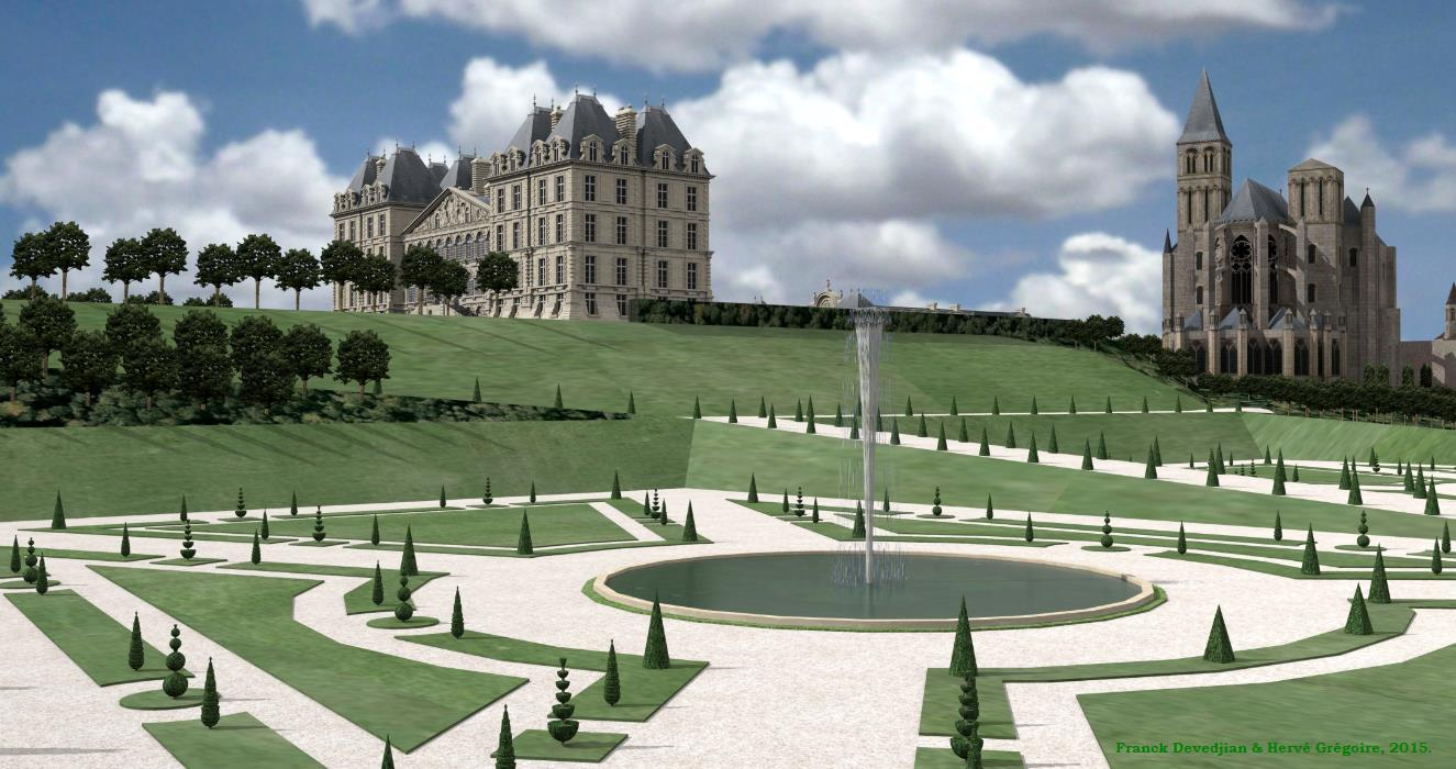 Vue 3D du château et de l'abbaye depuis le parterre est. Etat vers 1720. Franck Devedjian & Hervé Grégoire, 2015.